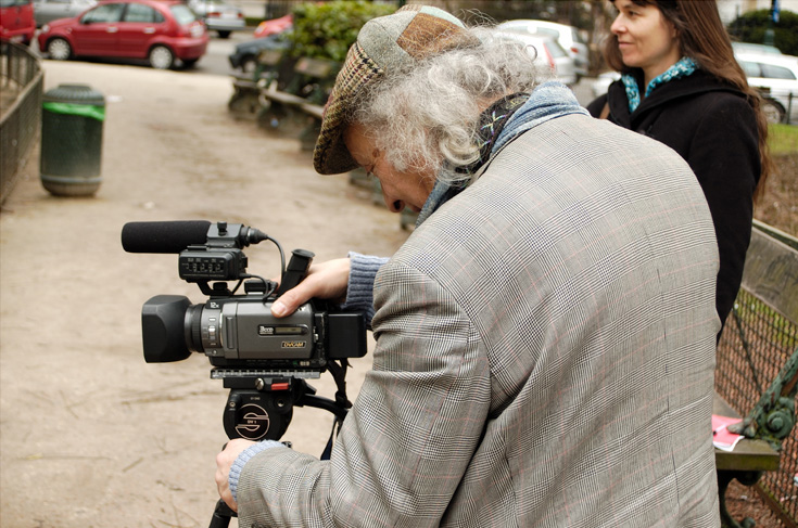 Boris Lehman